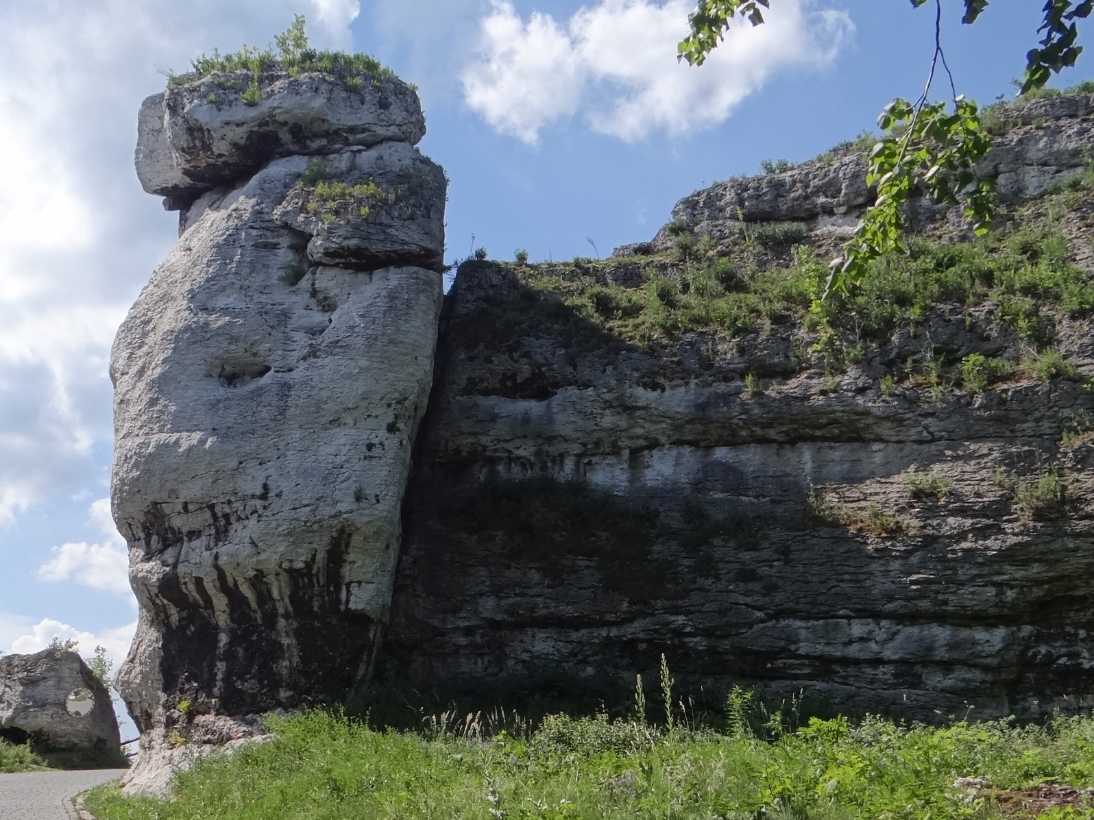 Skała Kapelusz w Podzamczu